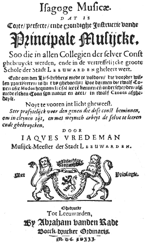 "Isagoge Musicæ, DAT IS Corte, perfecte ende grondighe Instructie vande Principale Musijcke", van Jacob Vredeman, muziekmeester van de stad Leeuwarden, uitgegeven in Leeuwarden in 1618.